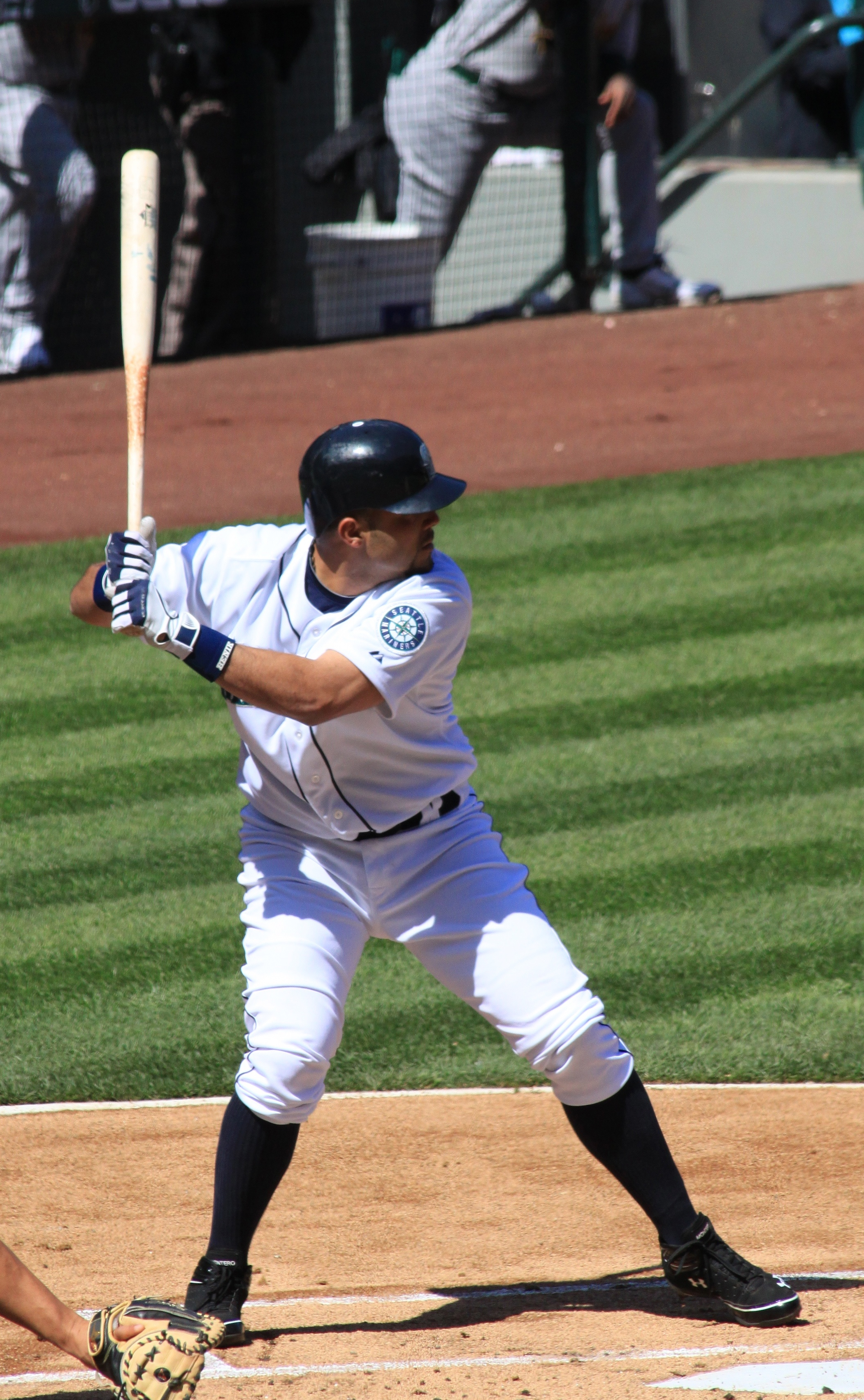 Jesús Montero